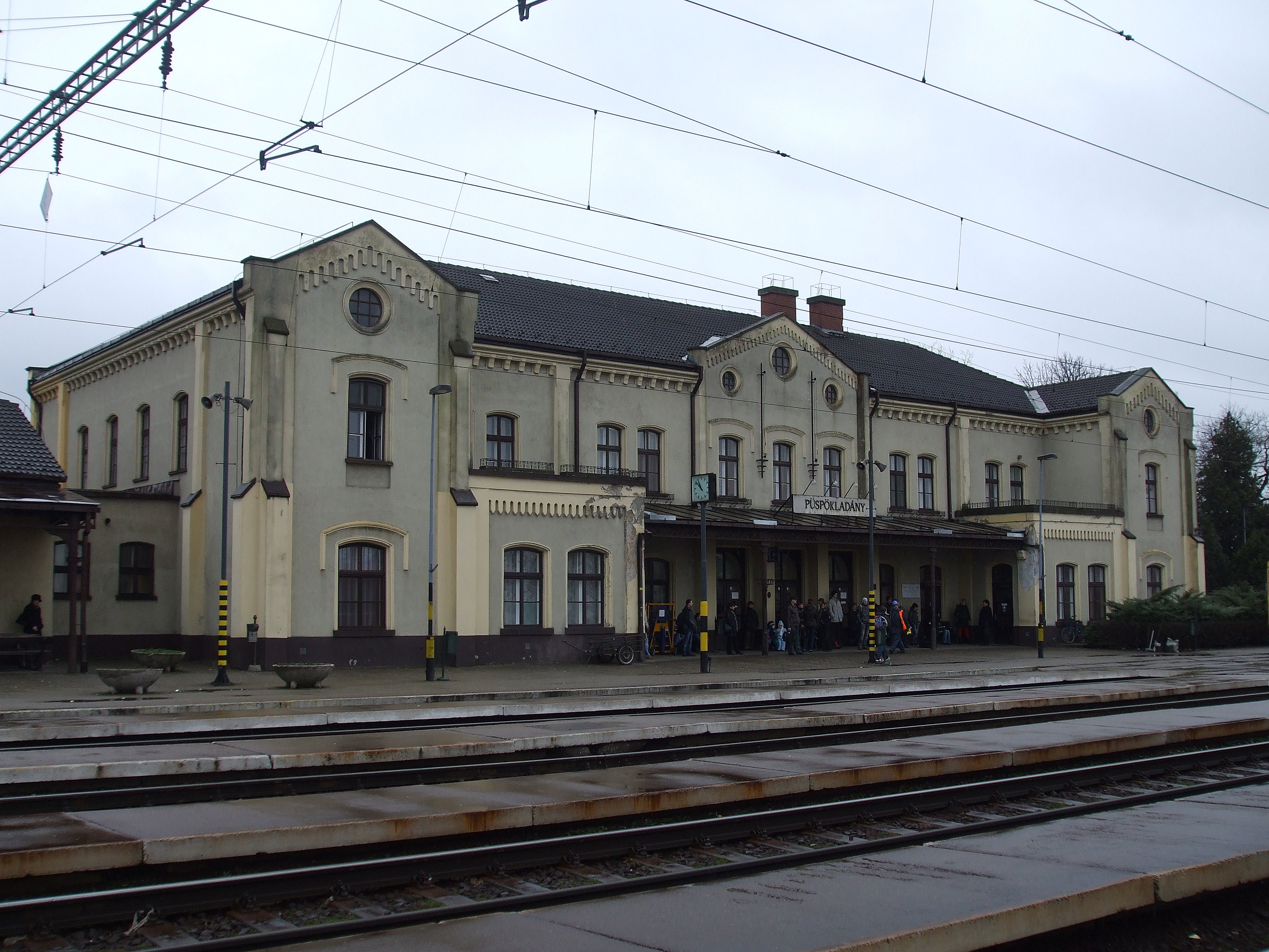 Püspökladány vasútállomás. Vasútállomás felvételi épülete, romantikus, 1857. Tervezte a Tiszavidéki Vasúttársaság bécsi tervezőirodája. Műemléki védelem, azonosító: 5381, törzsszám: 10391(Budapest–Szolnok–Debrecen–Nyíregyháza-vasútvonal, Püspökladány–Biharkeresztes-vasútvonal, Békéscsaba–Kötegyán–Vésztő–Püspökladány-vasútvonal) This is a photo of a monument in Hungary. Identifier: 5381